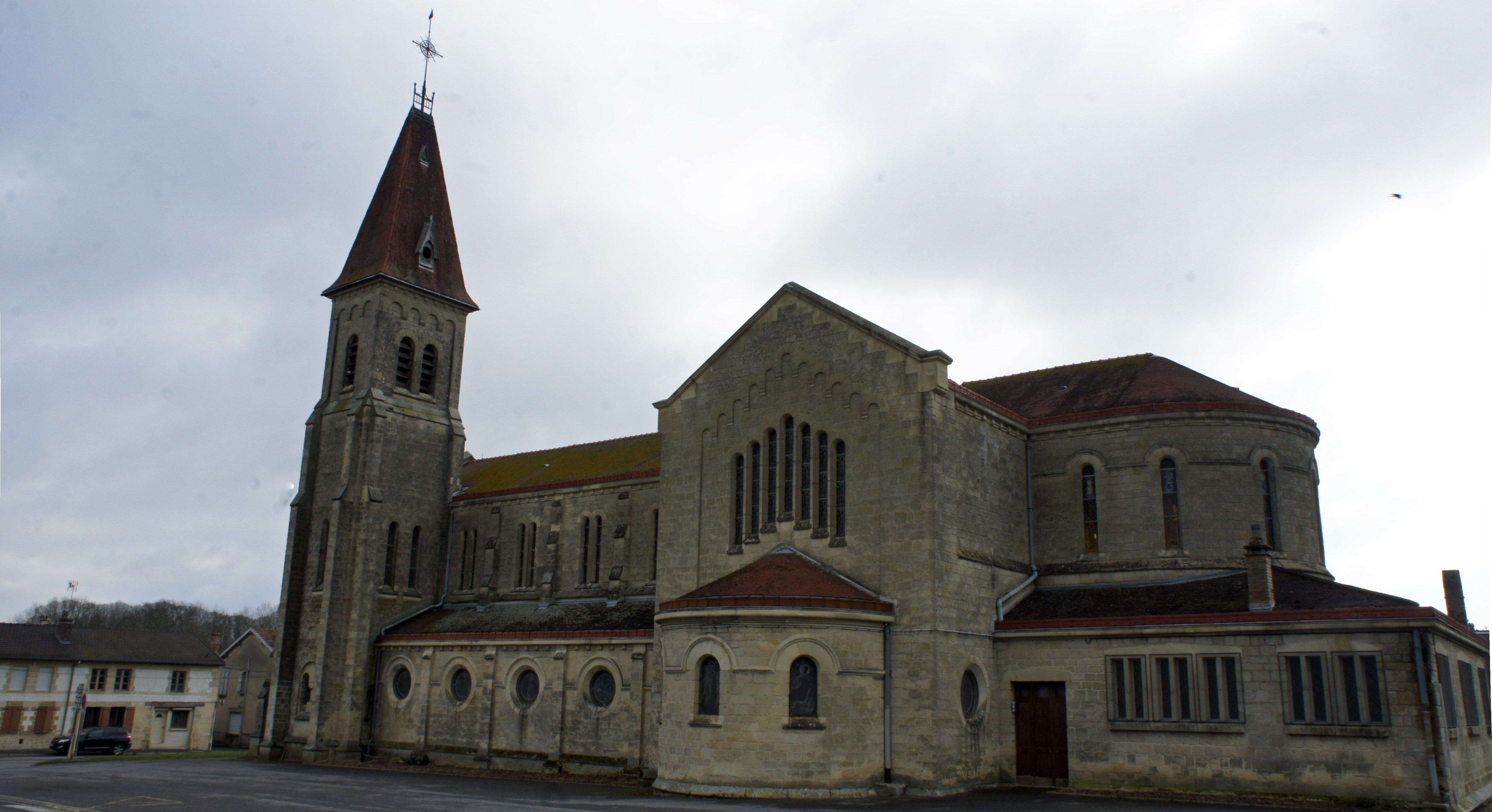 Pontfaverger, une vue de l'église_.